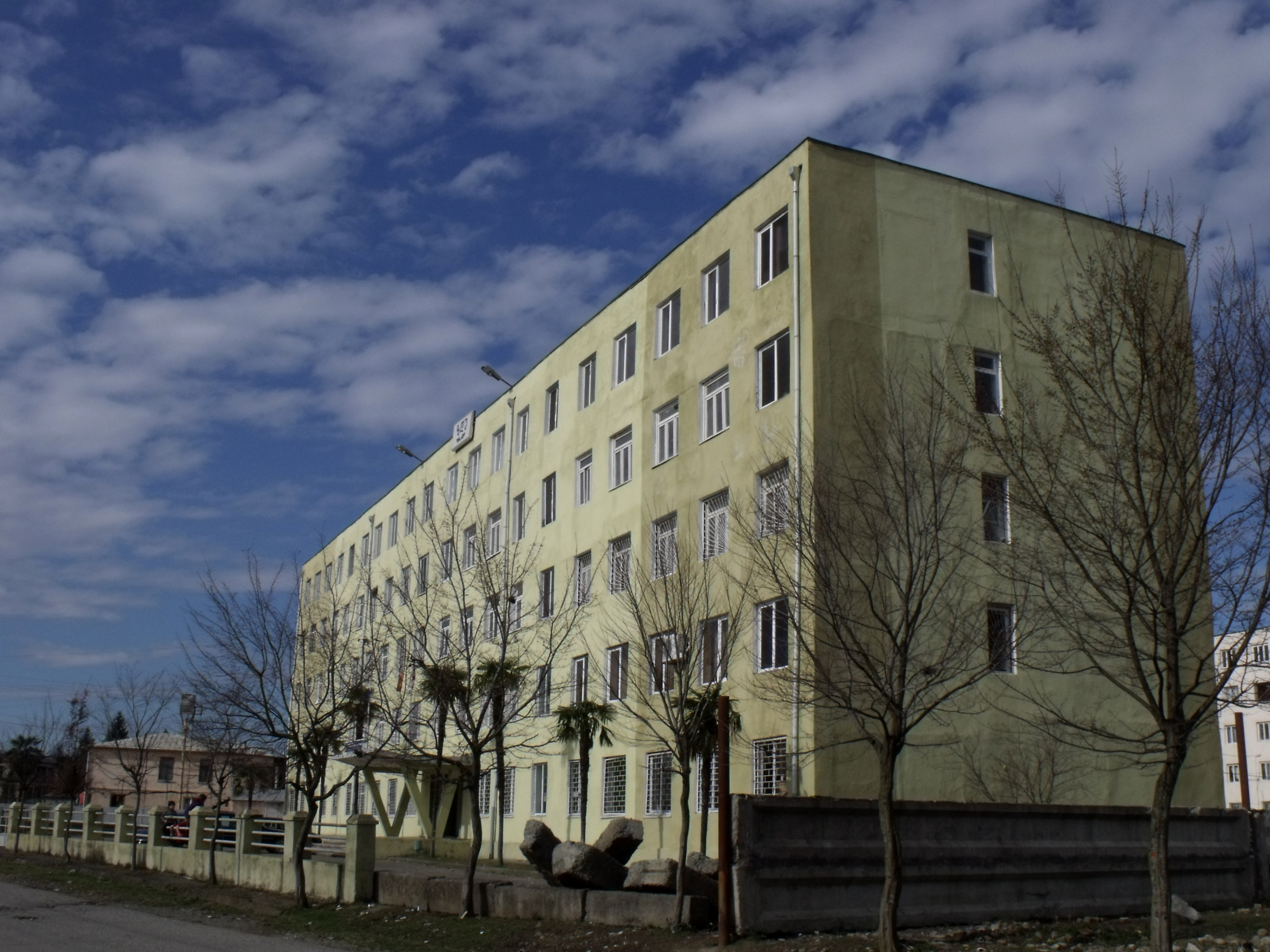 ზუგდიდის დამოუკიდებელი უნივერსიტეტი